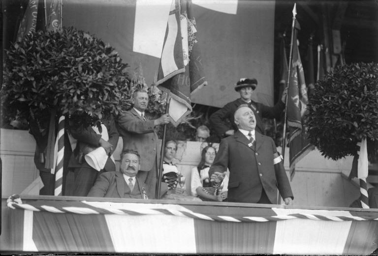 Eidgenössisches Hornusserfest: Ehrentribüne, Ansprache von Bundesrat Rudolf Minger